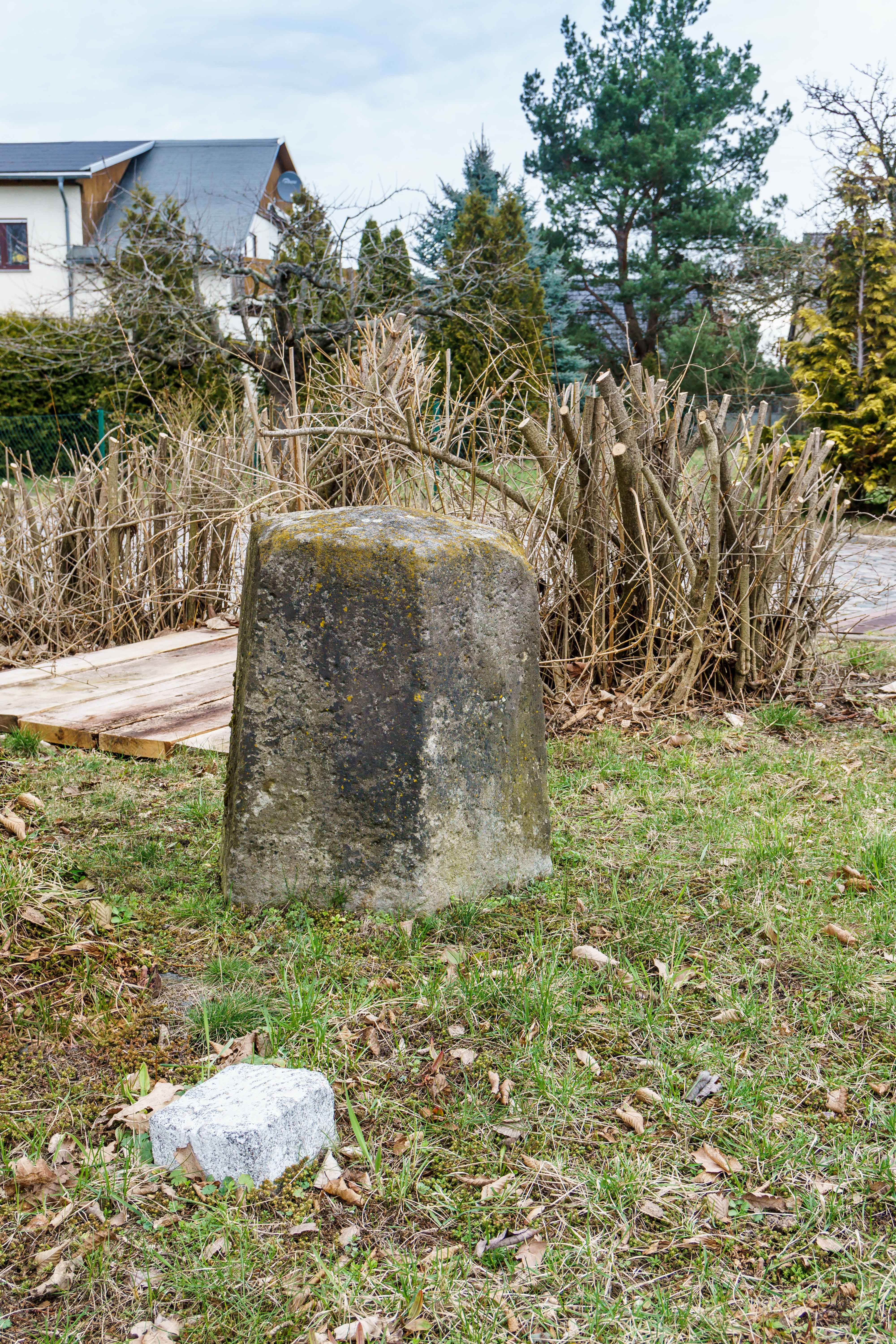 Preußischer Meilenstein (2128, Sechskantstein / Myriameterstein), Chausseestraße 31, B 100 in Muldestausee OT Gossa